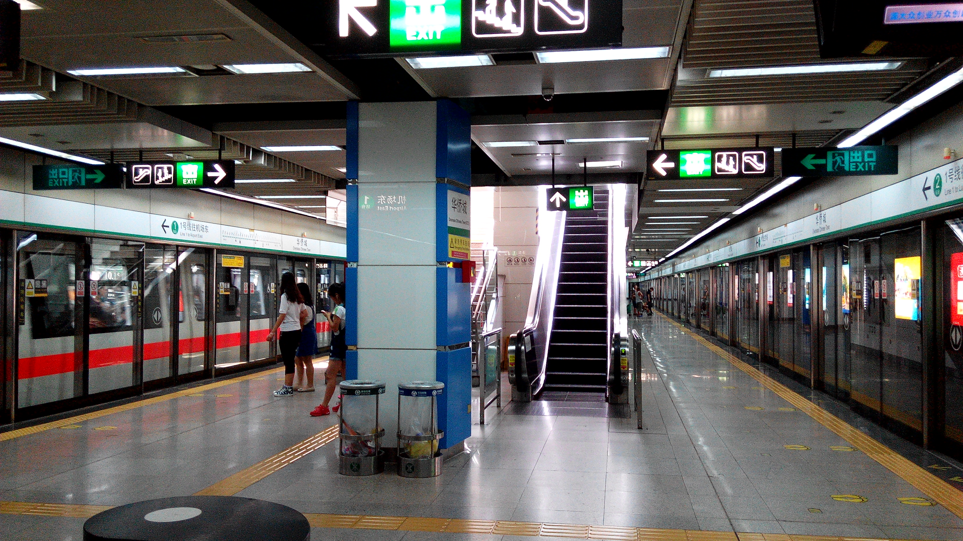 深圳地铁一号线 华侨城站站台